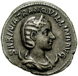 Portret van Tranuillina op een denariu'.